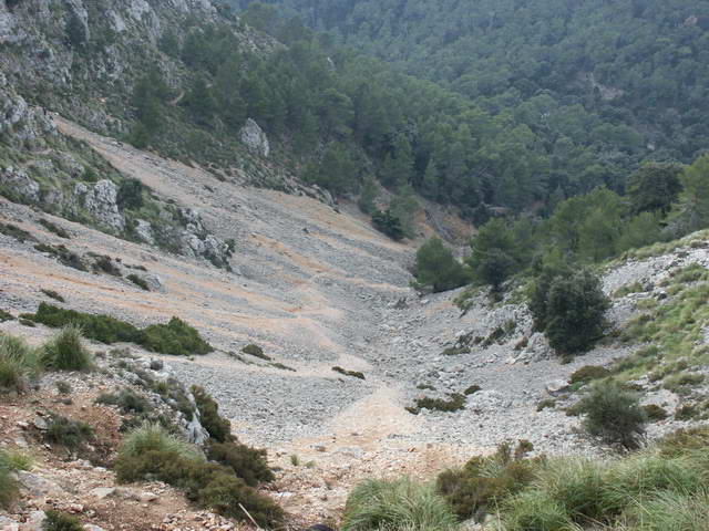 Rosseguera del Puig Tomir. Escorca. Mallorca.